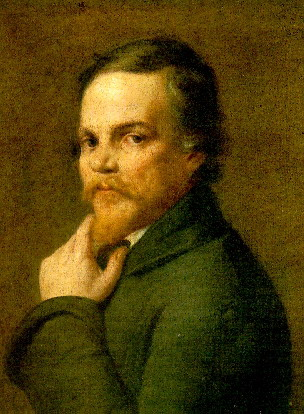 Николай Михайлович Языков. Портрет Э. А. Дмитриева-Мамонова, 1840-е